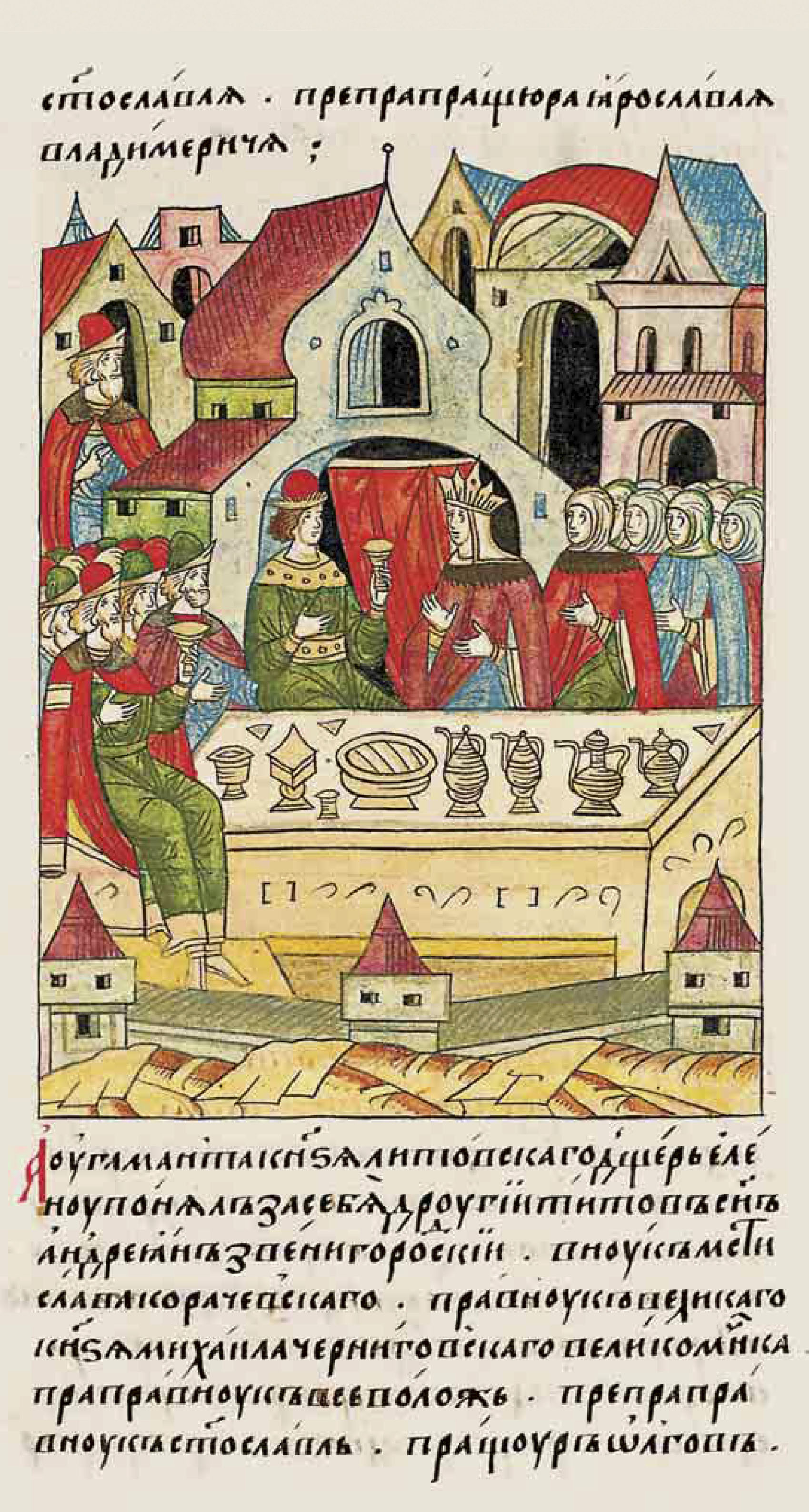 ЛИЦЕВОЙ ЛЕТОПИСНЫЙ СВОД А дочь князя Литовского Гаманта Елену взял за себя другой сын Тита Андриан Звенигородский, внук Мстислава Корачевского, правнук великомученика великого князя Михаила Черниговского, праправнук» Всеволода, препраправнука Святослава, [потомка] пращура Олега, [прапращура Святослава, препрапращура Ярослава Владимировича.]